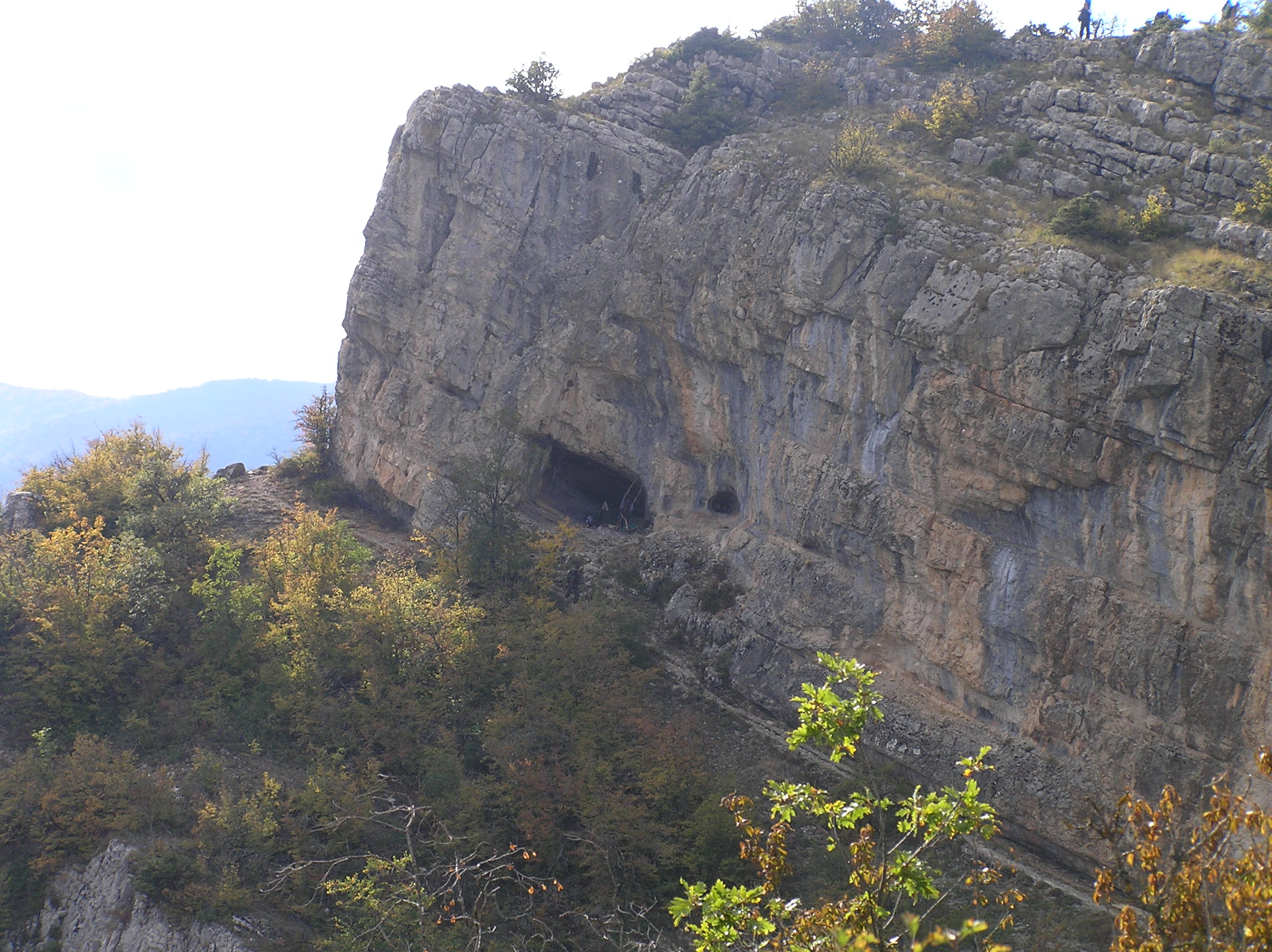 Вид на Коровий грот